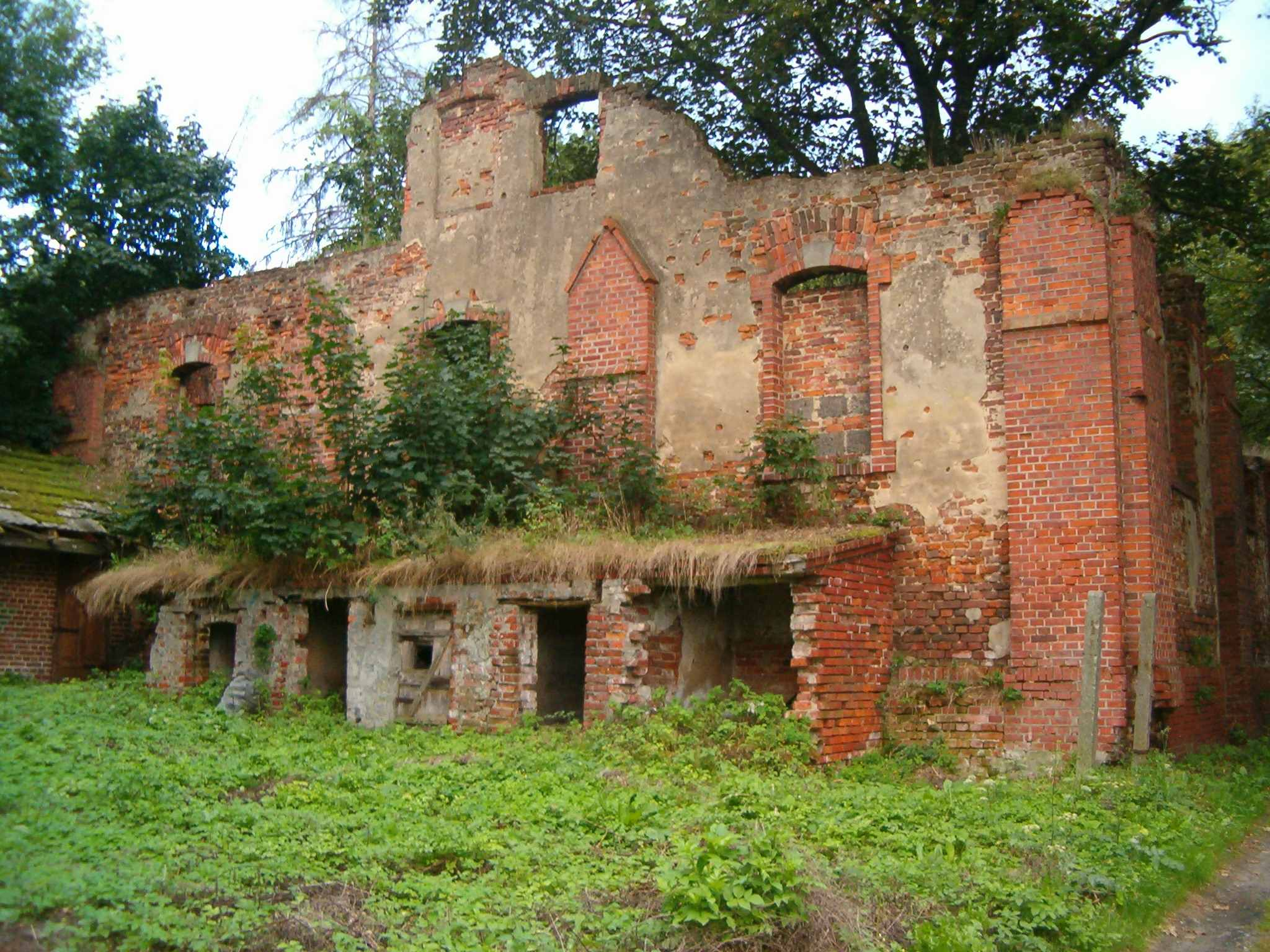 Ujeżdżalnia. Pałac w Krowiarkach